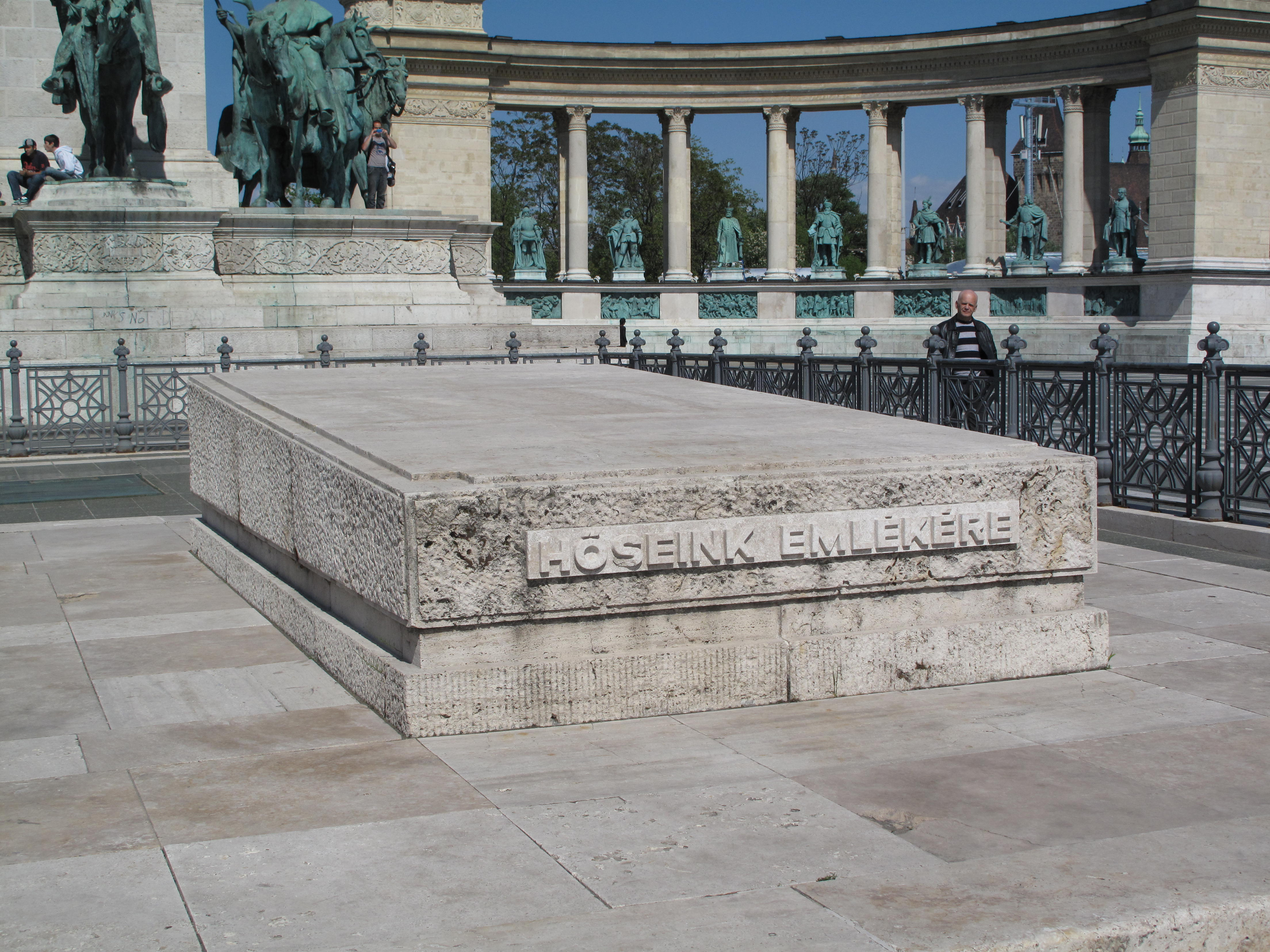 Náměstí Hrdinů, Budapešť